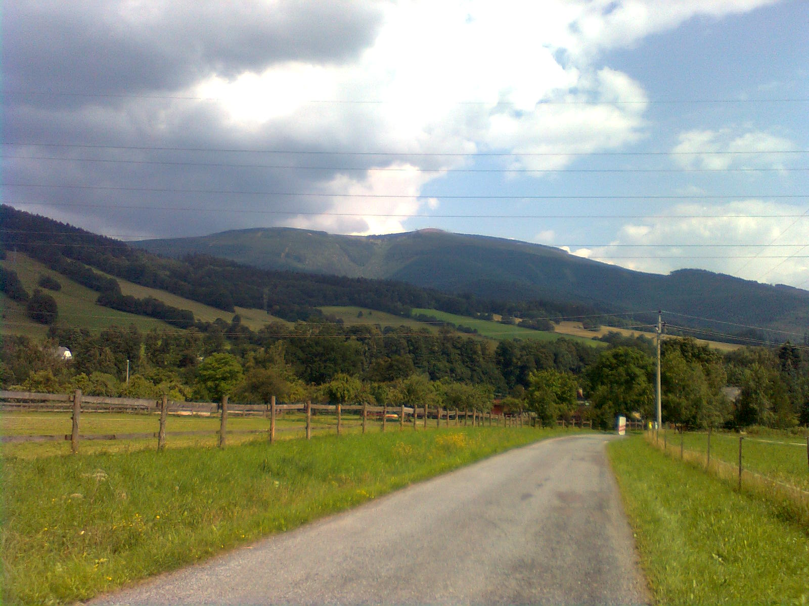 Widok z miejscowości Rejhotice na szczyty: Kamenec (1), Mravenečník i Čepel, po lewej stok Skály